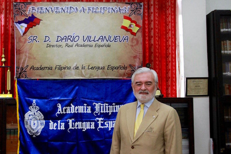 Direktor der RAE Dario Villanueva während seines letzten Besuchs auf den Philippinen (2017)